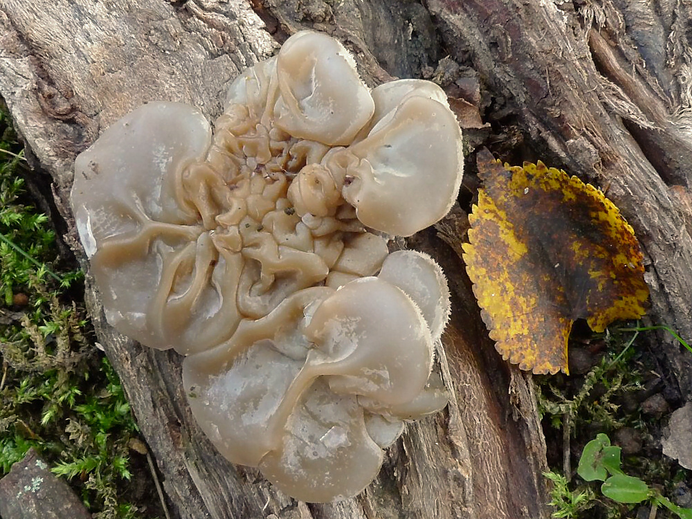 Auricularia mesenterica, Rieupeyroux (Aveyron, France)